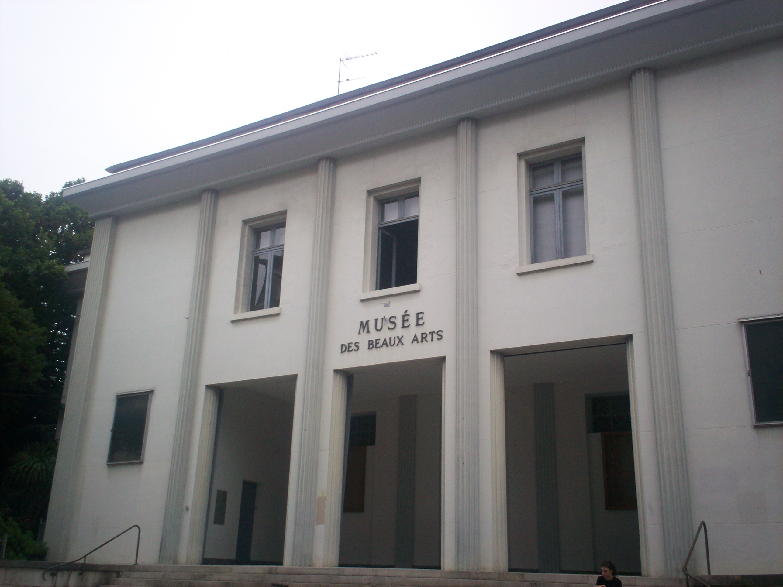 Musèu de las Bèras Arts de Pau (Aquitaine, France), Fotografia personala dada a wikipedia